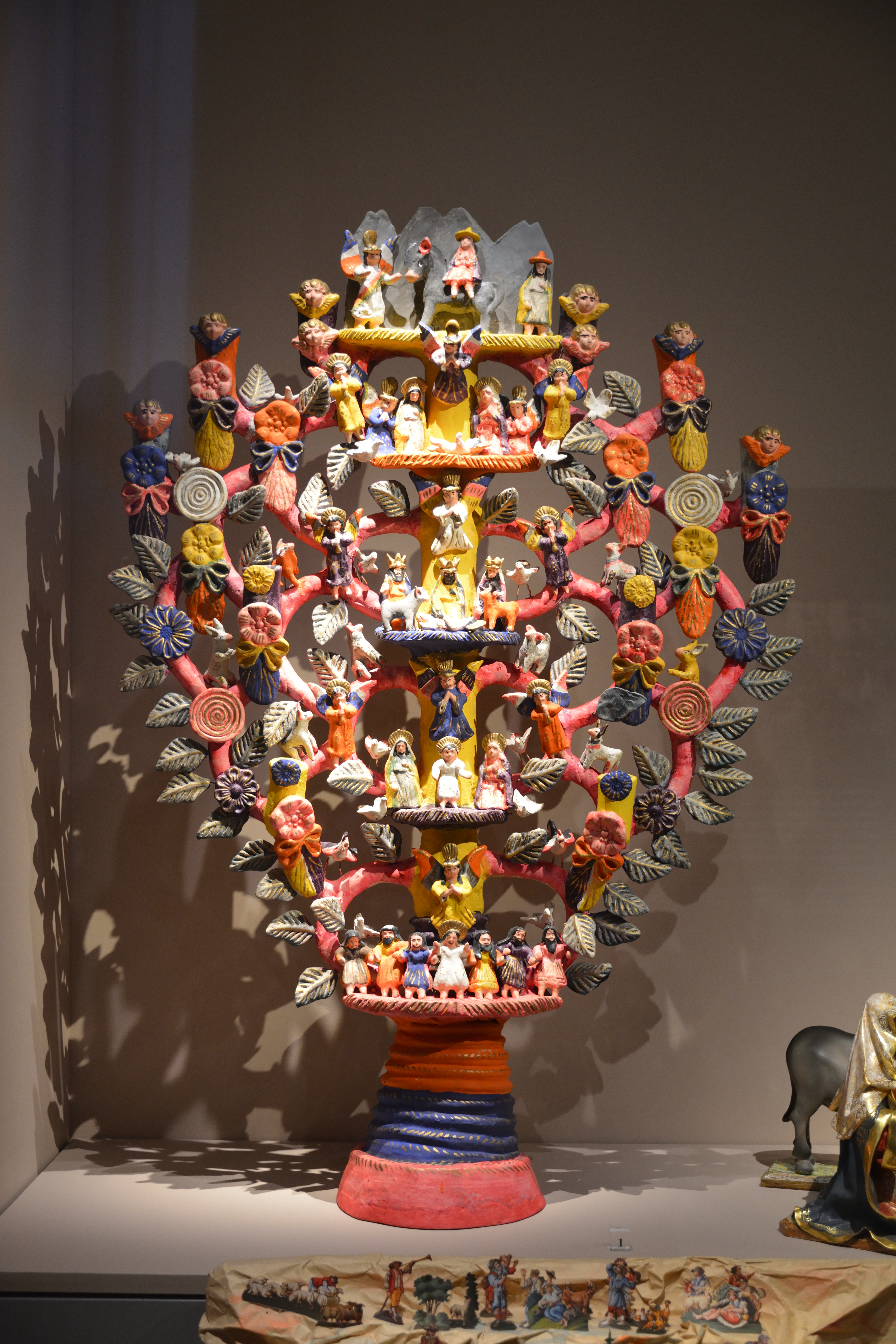 Impressionen aus dem Museum Europäischer Kulturen in BerlinHier: Blick in die Dauerausstellung: Religiöse Volkskunst? Lebensbaum aus Metepec/Mexico (um 1980)